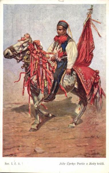 Obrázky Jožy Uprky na pohlednicích